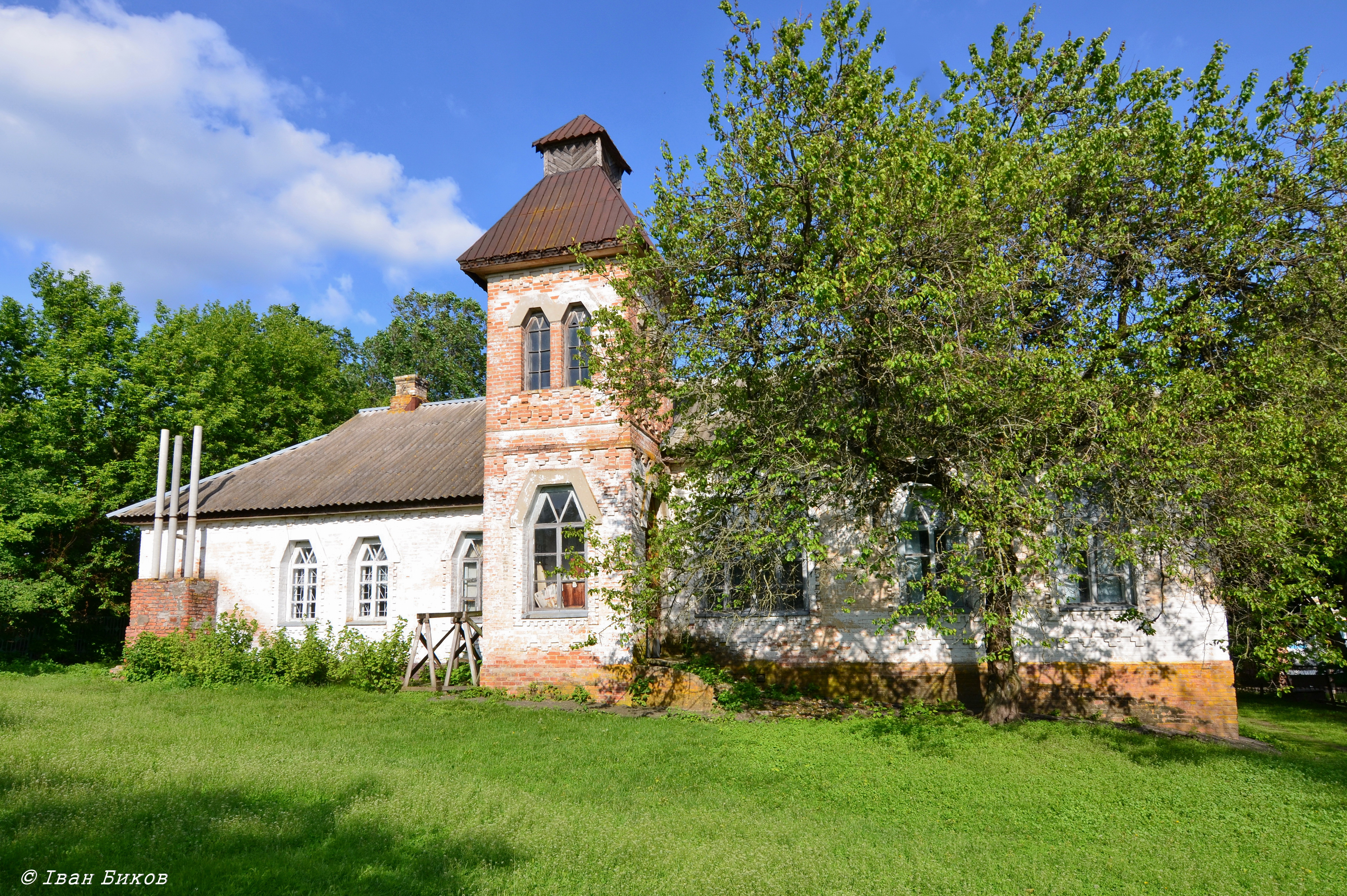 Збудована у 1912-13 рр. за проектом митця Опанаса Сластіона. Репрезентує стиль український архітектурний модерн.